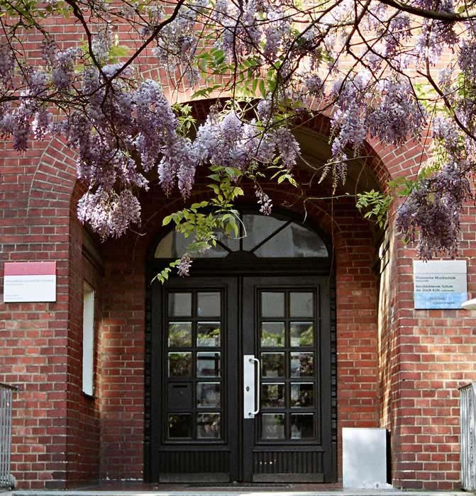 Eingang ehemalige Strohhutfabrik Silberberg & Mayer Köln-Sülz